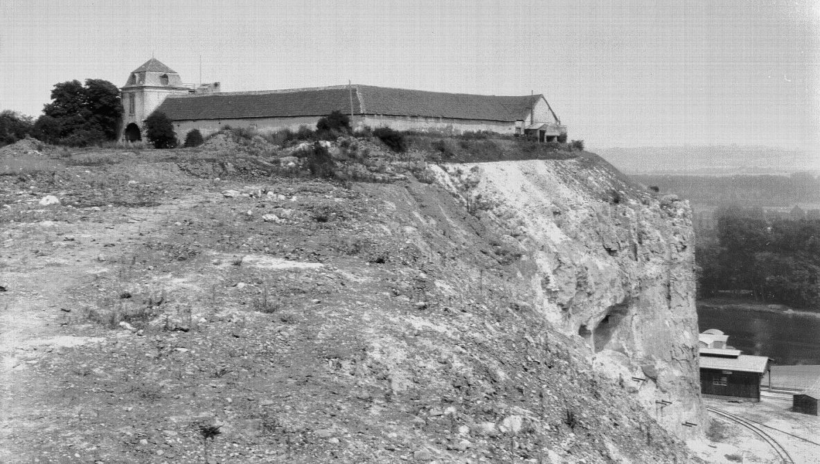 Slavante En Slot Lichtenberg: ruïne en hoeve Ligtenberg